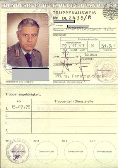 Truppenausweis der Bundeswehr, Vorderseite; hier Ausfertigung für Reservisten (bis 2000), erkennbar an /R hinter der Nummer